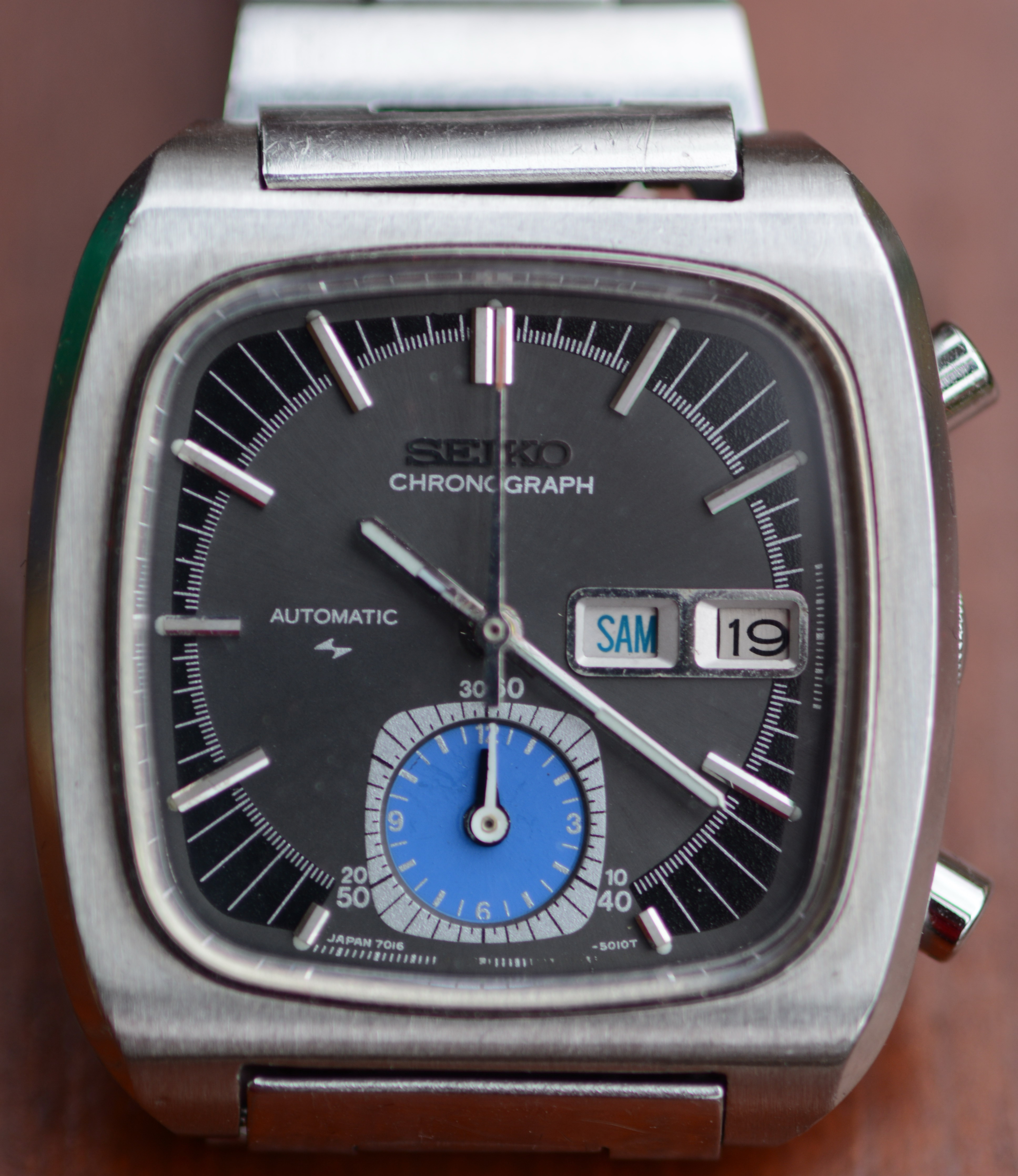 Seiko Flyback-Automatic-Chronograph Cal. 7016, genannt "Monaco"